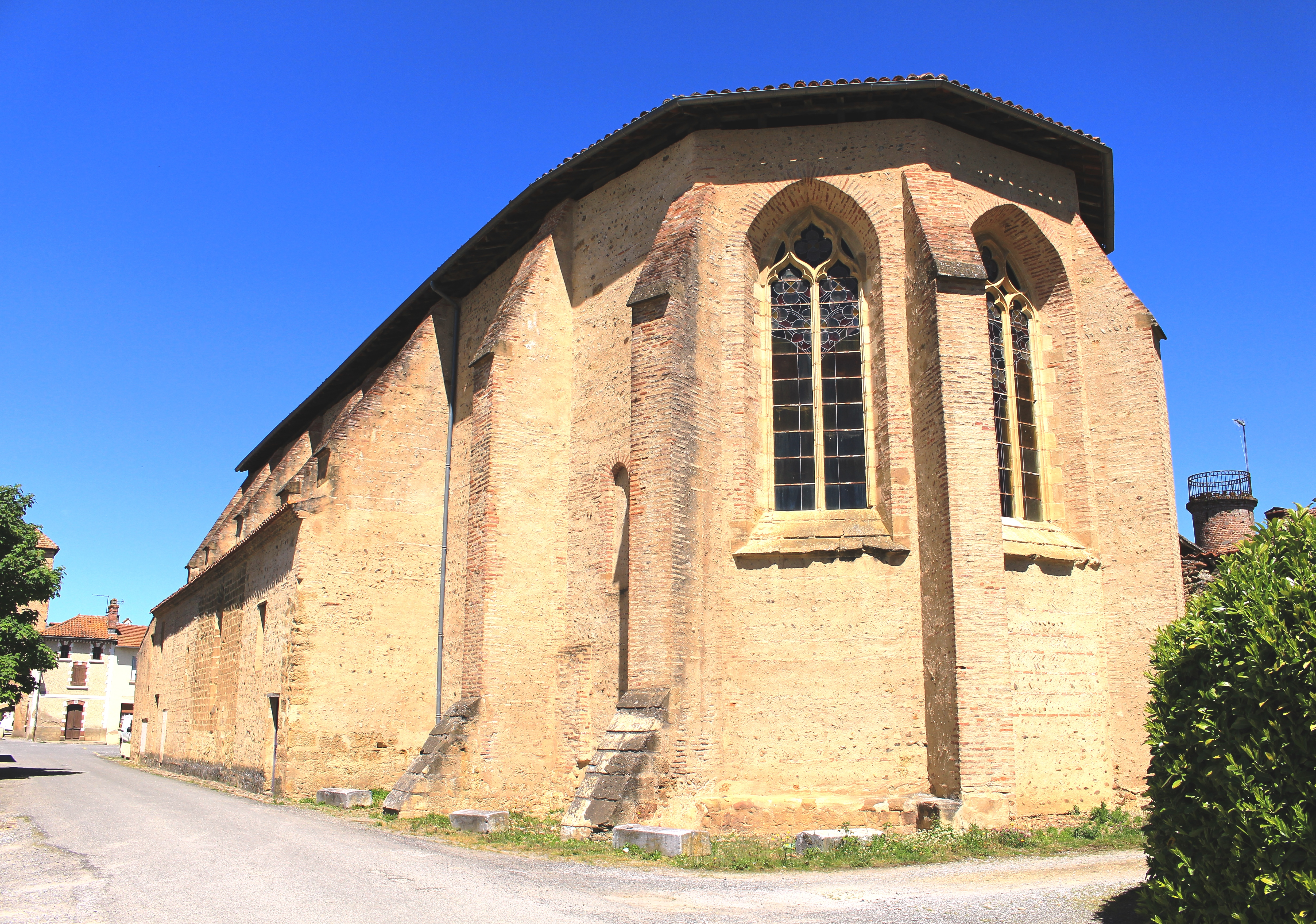 Église des Carmes de Trie-sur-Baïse (Hautes-Pyrénées)